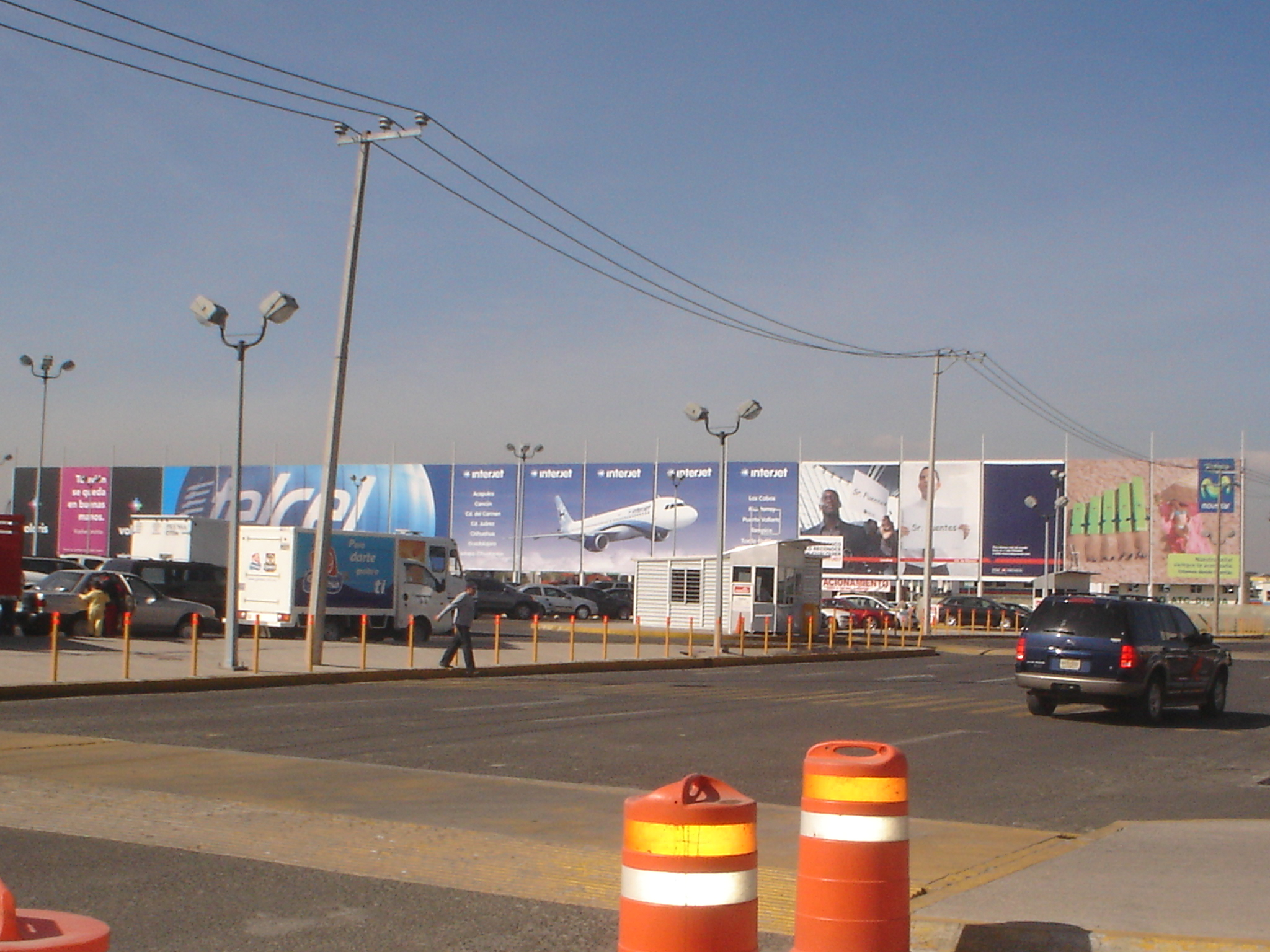 Estacionamiento del Aeropuerto de Toluca